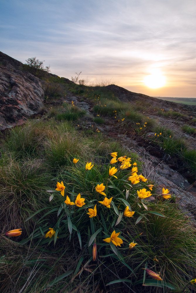 Український степовий природний заповідник Кам'яні Могили